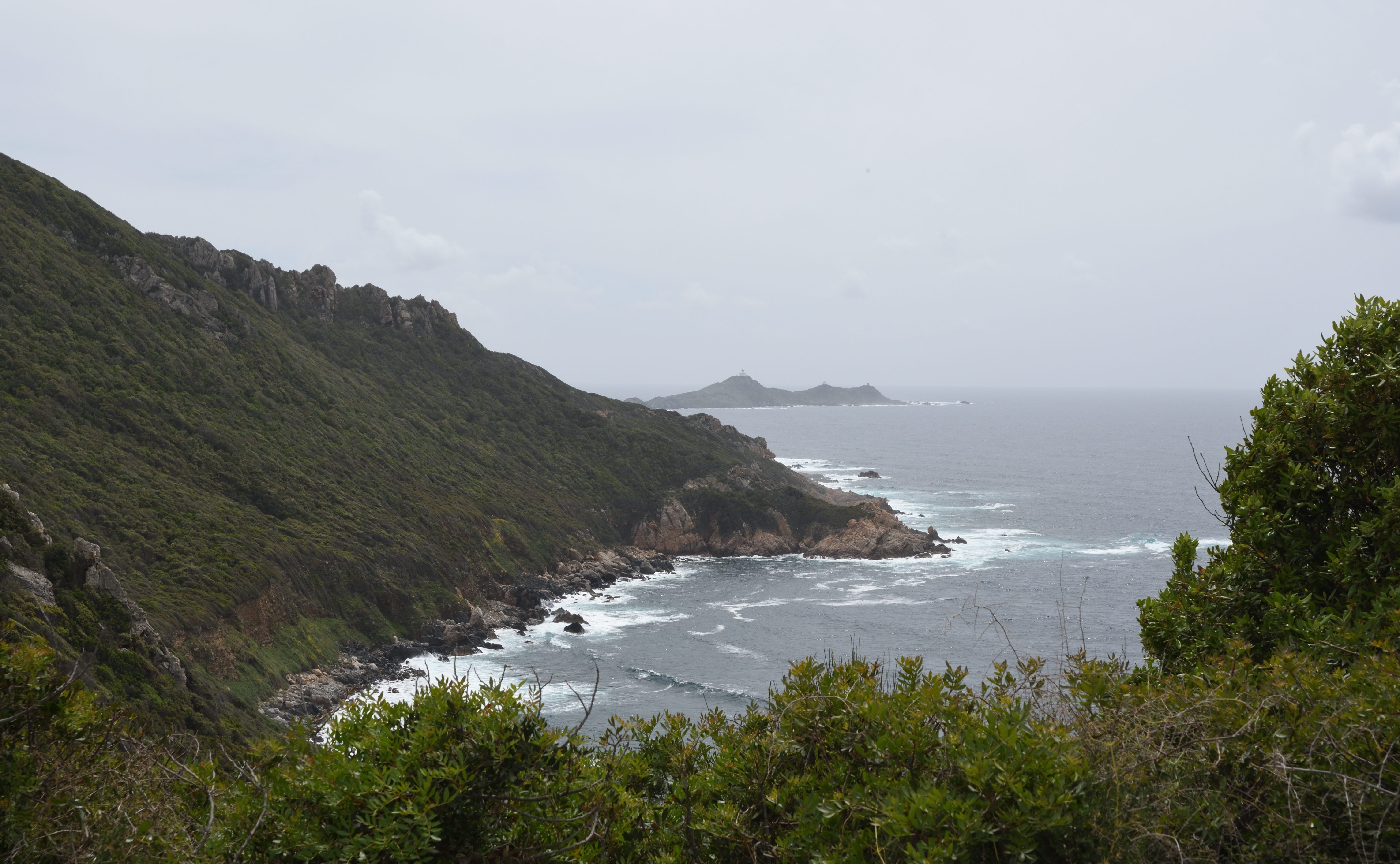 Randonée côtière au nord de la pointe de la Parata près de Ajaccio en Corse